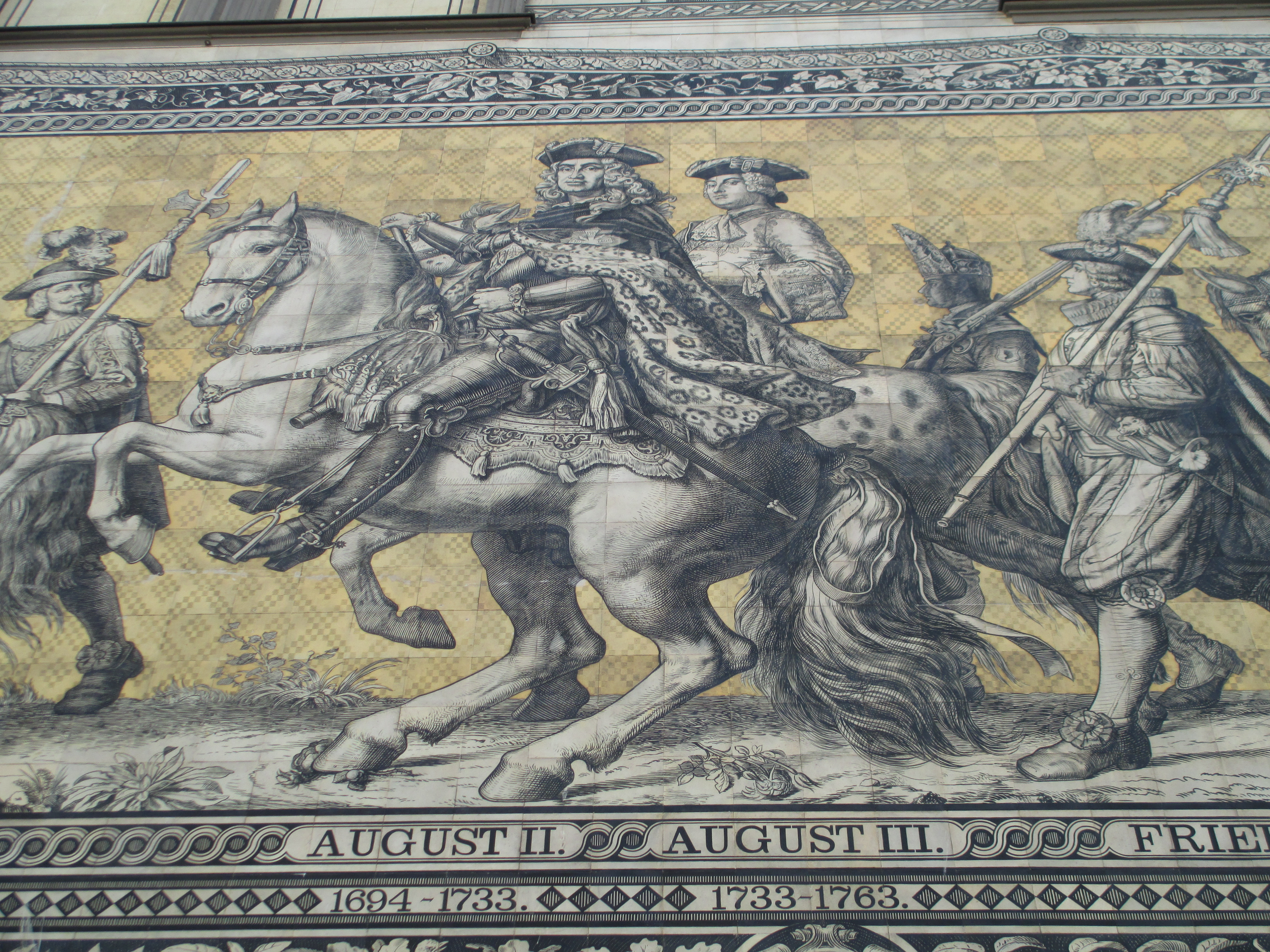 תהלוכת הנסיכים בדרזדן